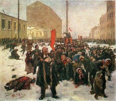 "Il 9 gennaio 1905", olio su tela, Museo della Rivoluzione, Mosca